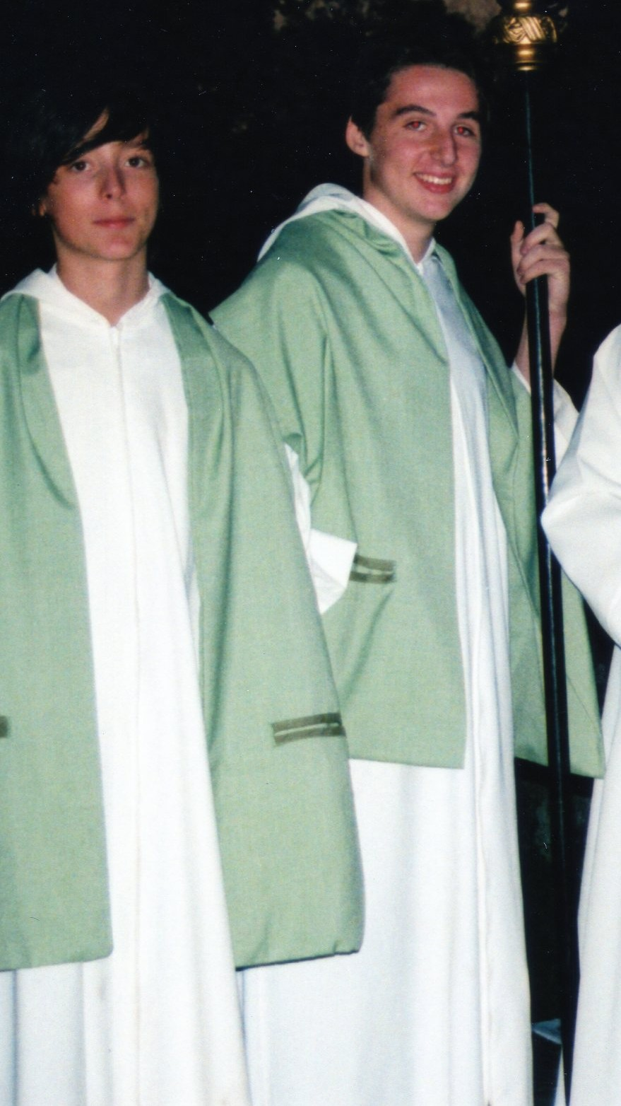 Vimpa: possono essere chiaramente viste le "tasche" per inserire le mani quando il caudatario tiene il pastorale o la mitria.